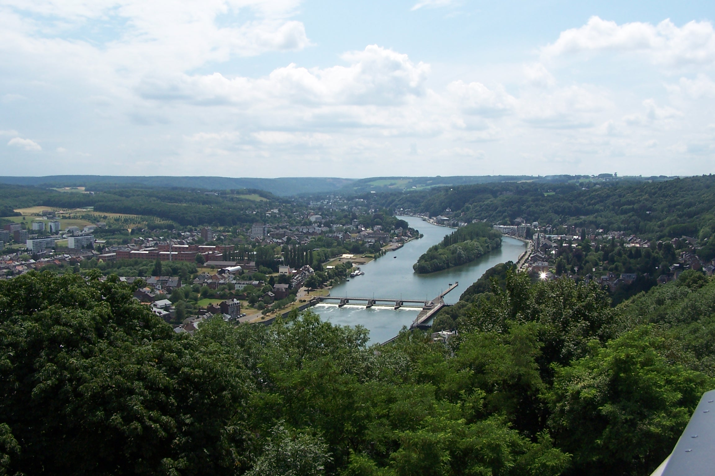 Schiervlakte in de Ardennen, eigen werk 05-07-2006